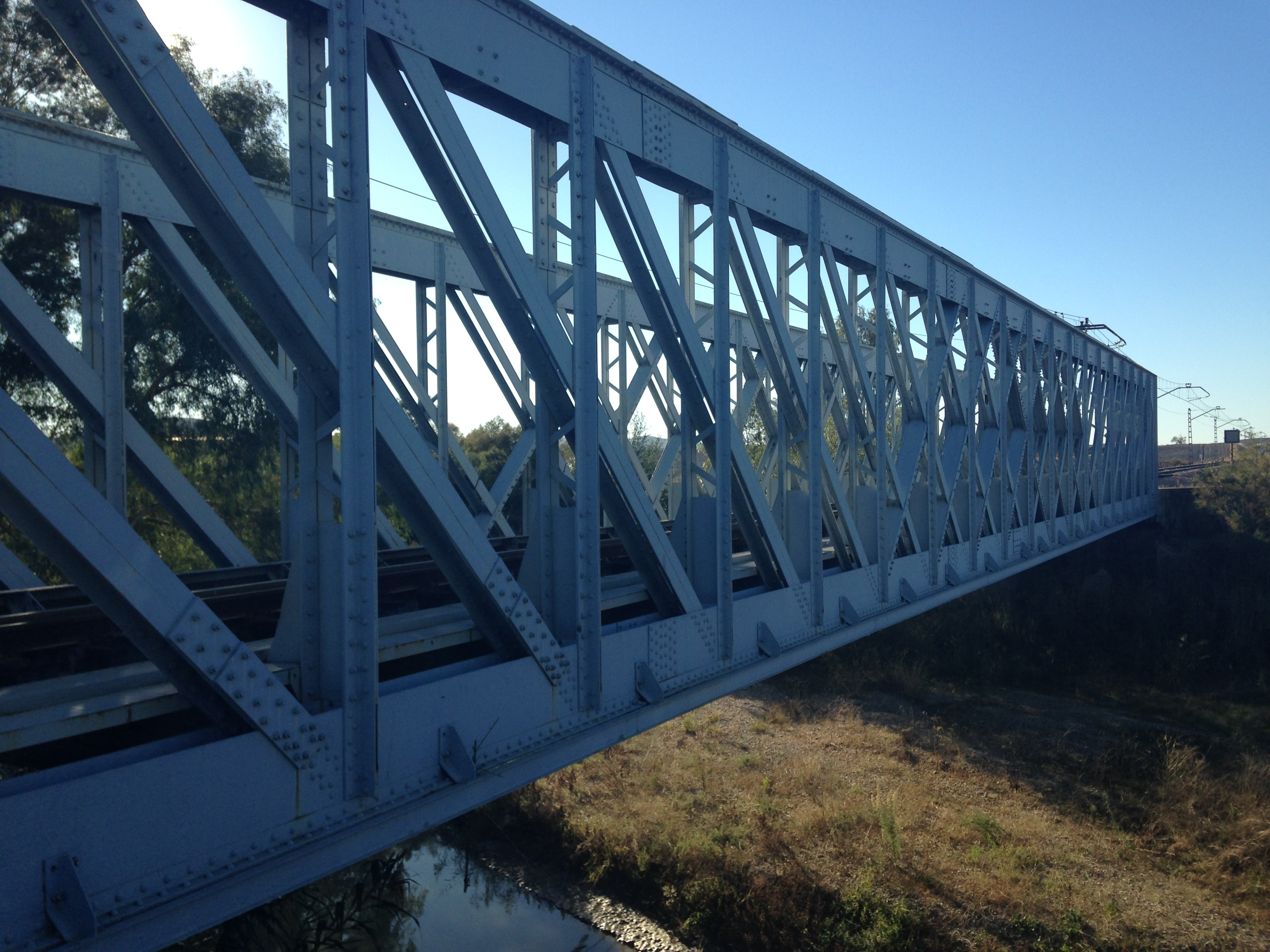 Puente sobre el Río Guadajoz entre una fábrica de hidrocarburos y la Estación del Chaparral